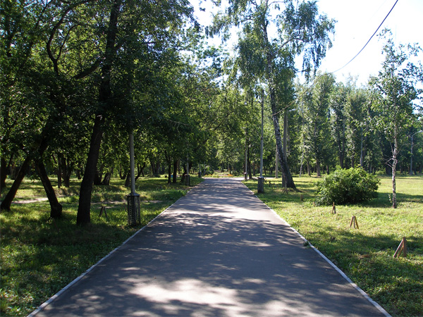 Аллея в Изумрудном парке Барнаула